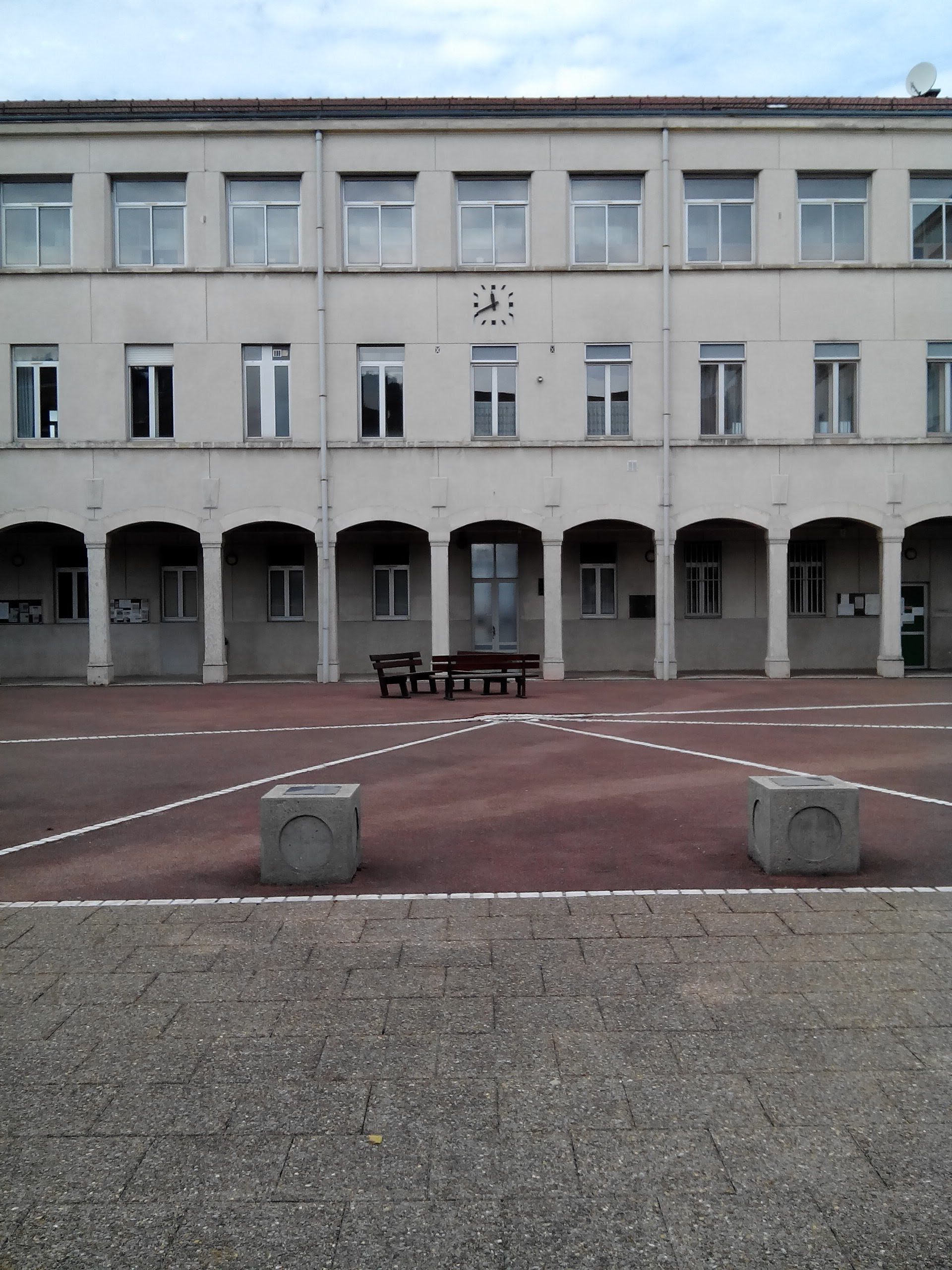 Cour du lycée Paul Painlevé à Oyonnax. On voit les pavés blancs qui commémorent l'endroit où l'obus allemand est tombé